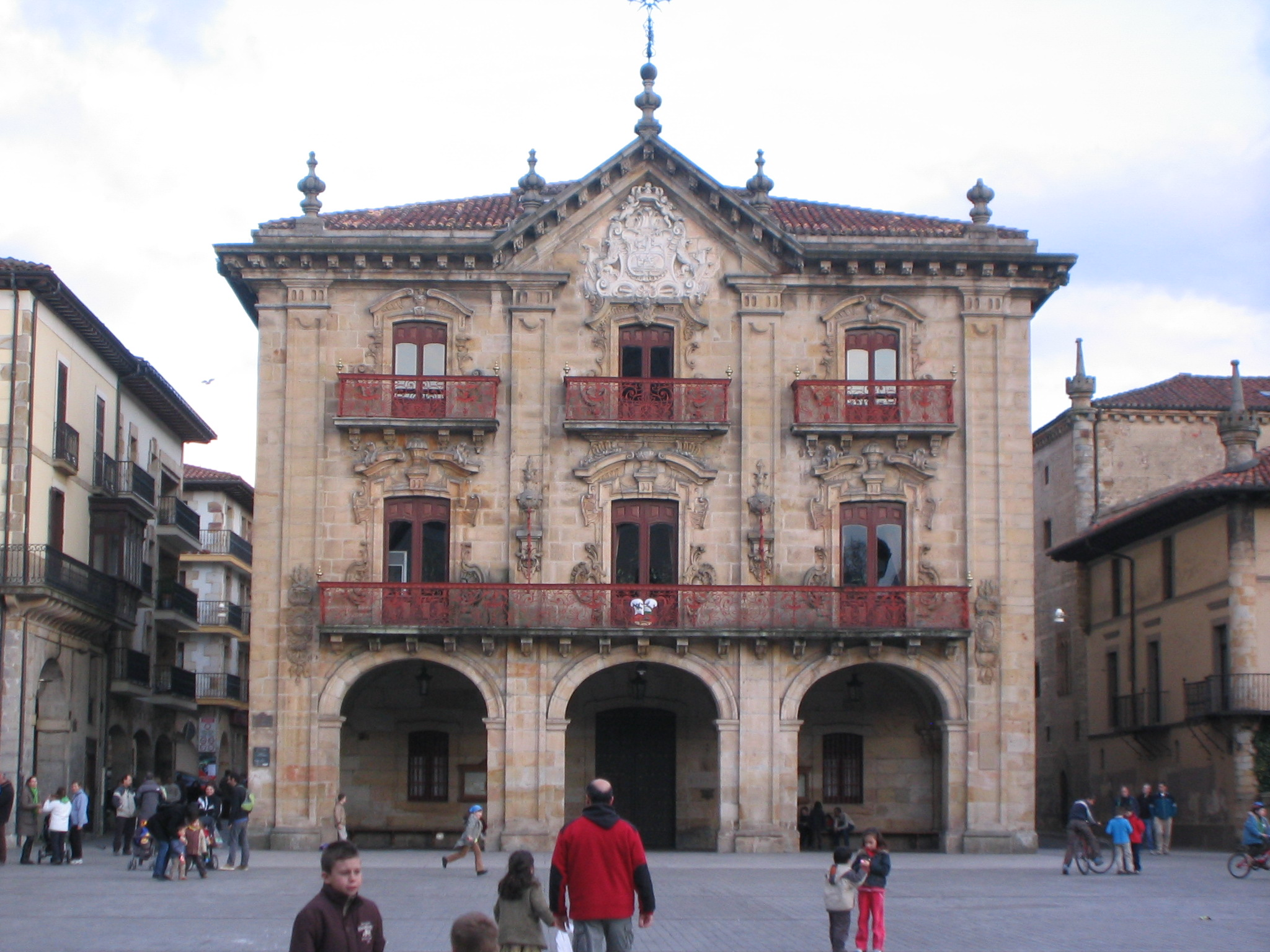 Ayuntamiento de Oñate (Guipúzcoa) País Vasco (España).